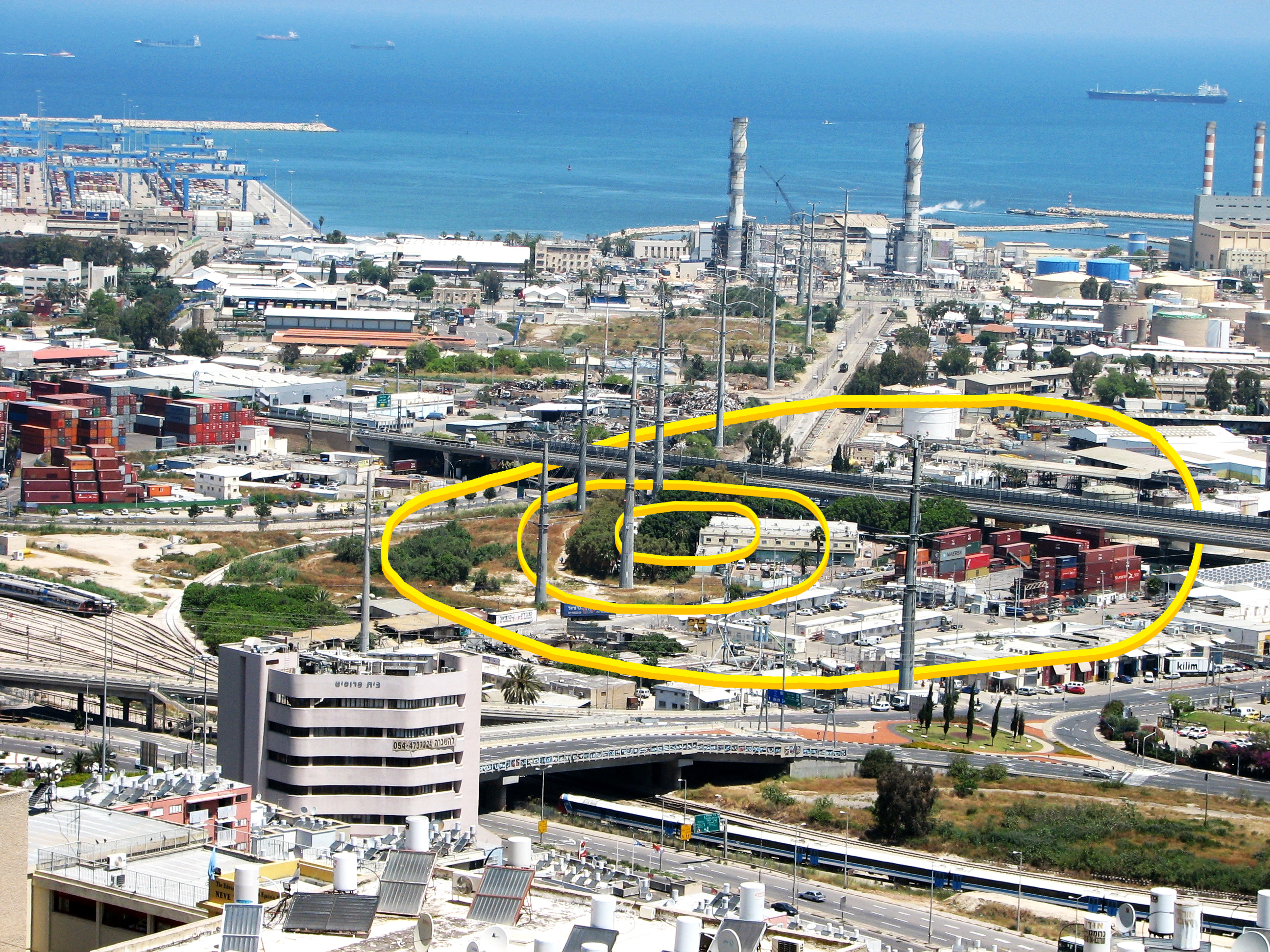 תל אבו הואם - שרטוט תוכנית מיקומו של התל על גבי צילום מ-2011